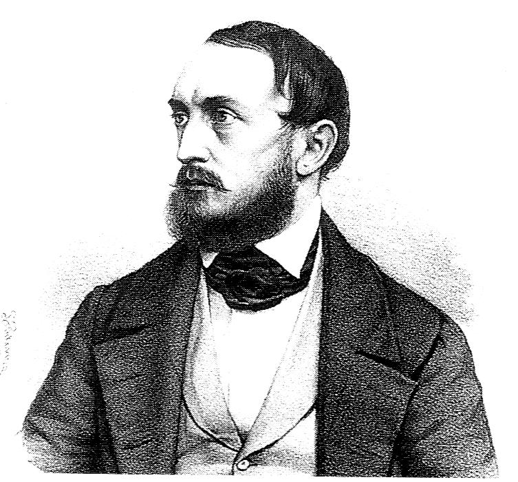 Wilhelm Adolph Trützschler (1818-1849), Abgeordneter der Paulskirche